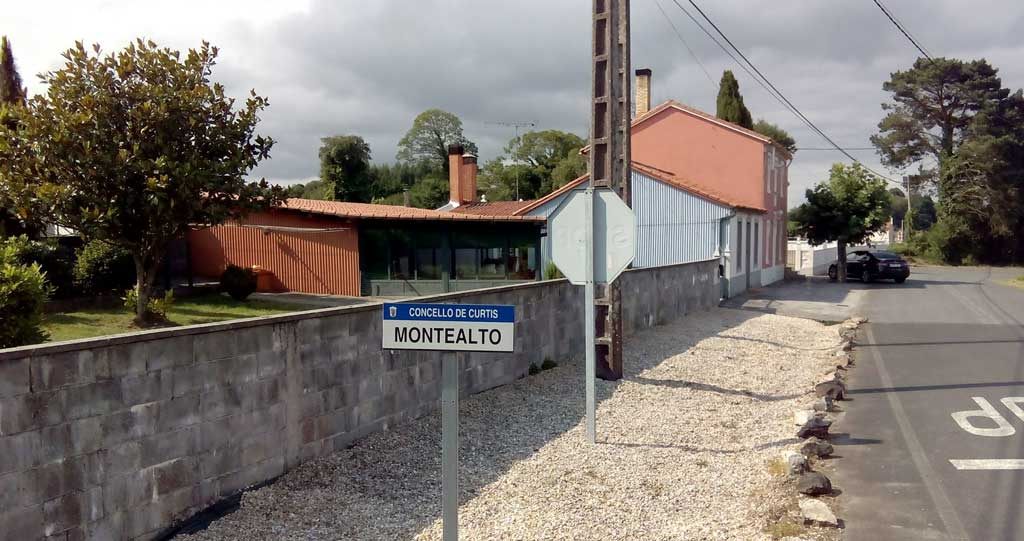 Vista de Montealto, Curtis.